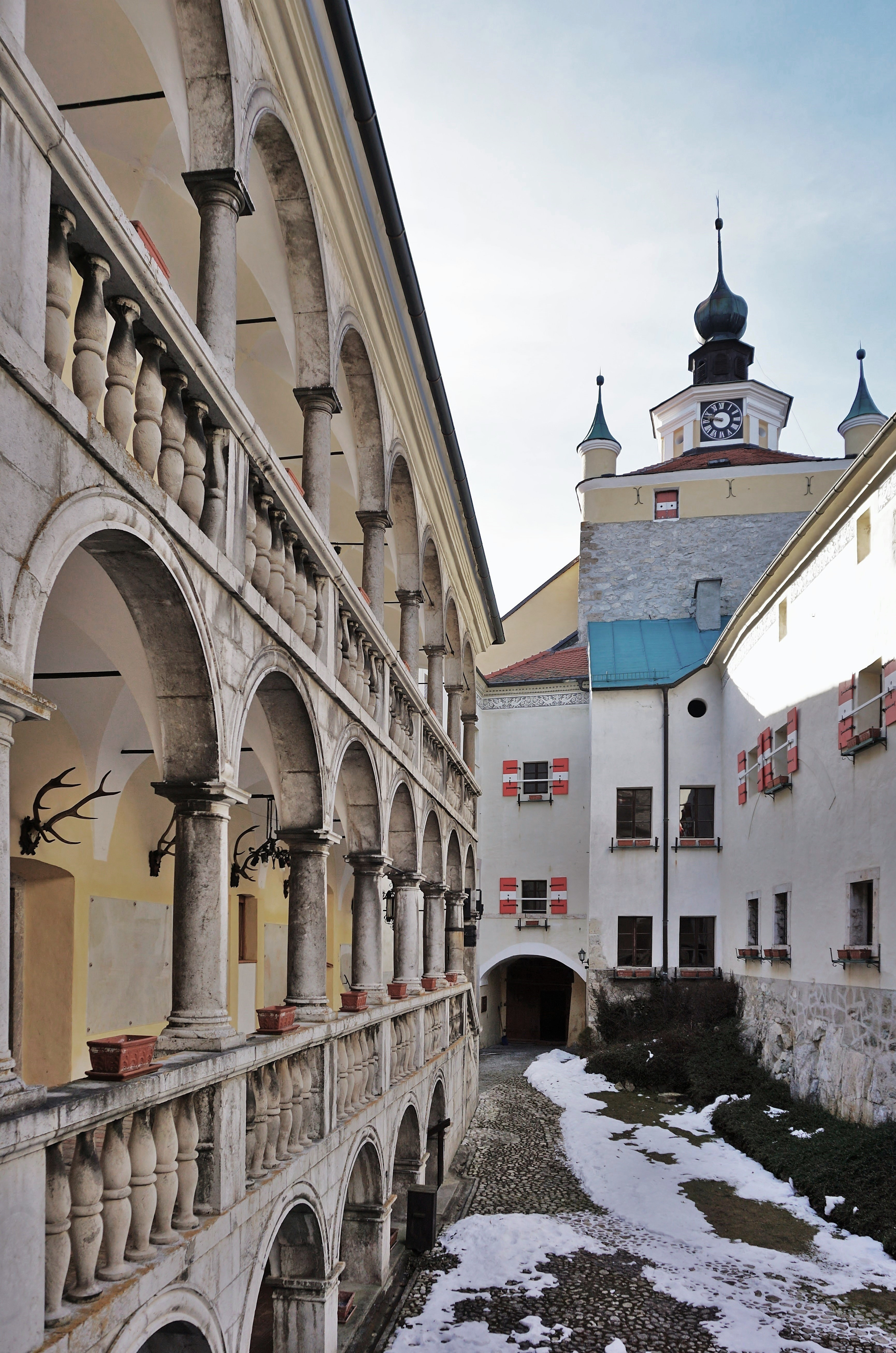 Schloss Strechau, Renaissance-Arkaden im Innenhof